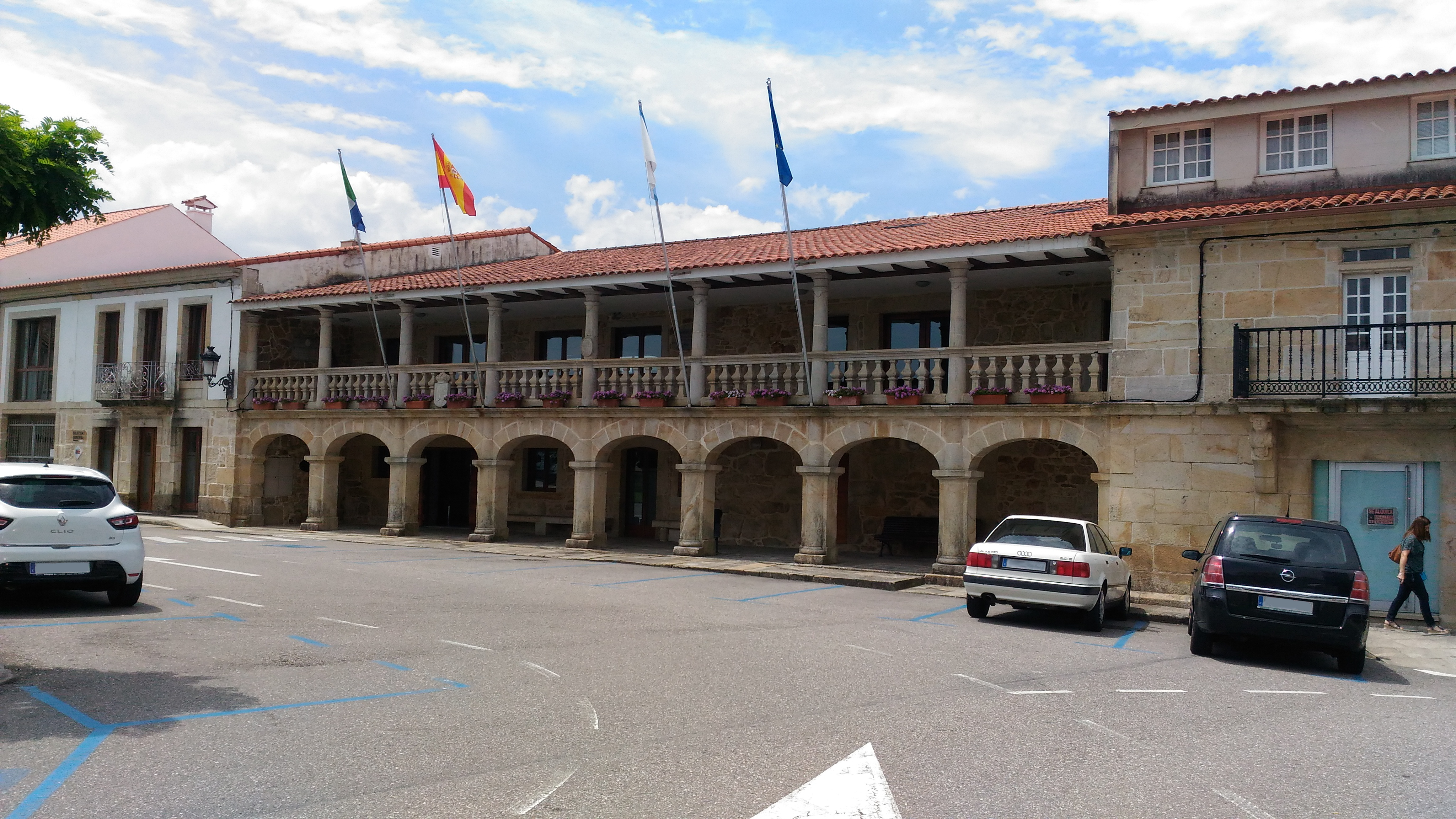 Casa do concello de O Rosal